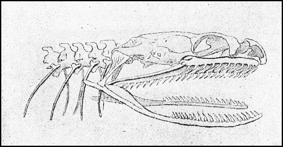 Skull of garter snake